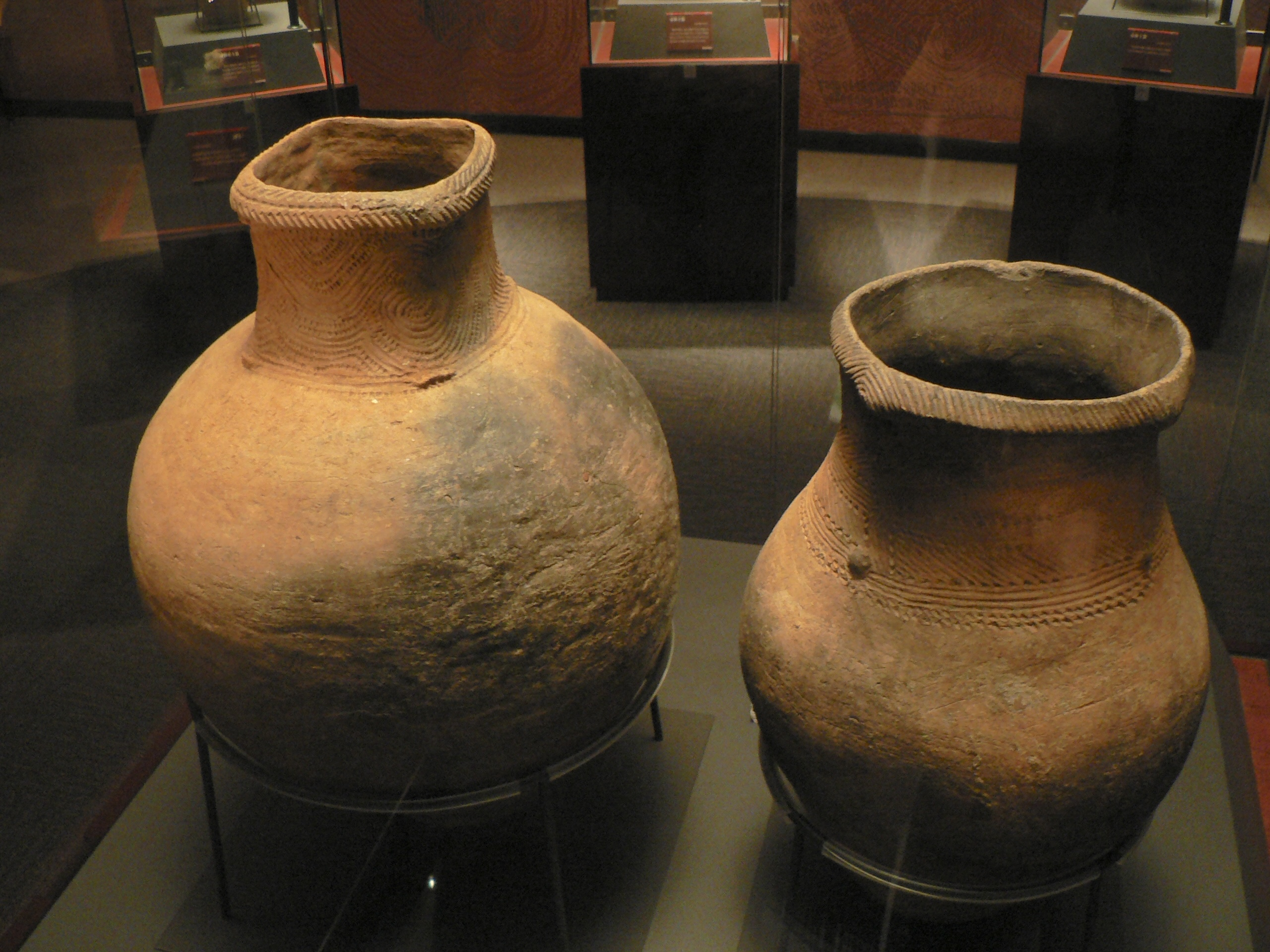 上野原遺跡から2つ1組で出土した壺型土器。一方は丸い口で、もう一方が角い口である。国の重要文化財に指定されている。